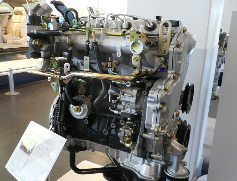 Nissan YD22DDTi engine.